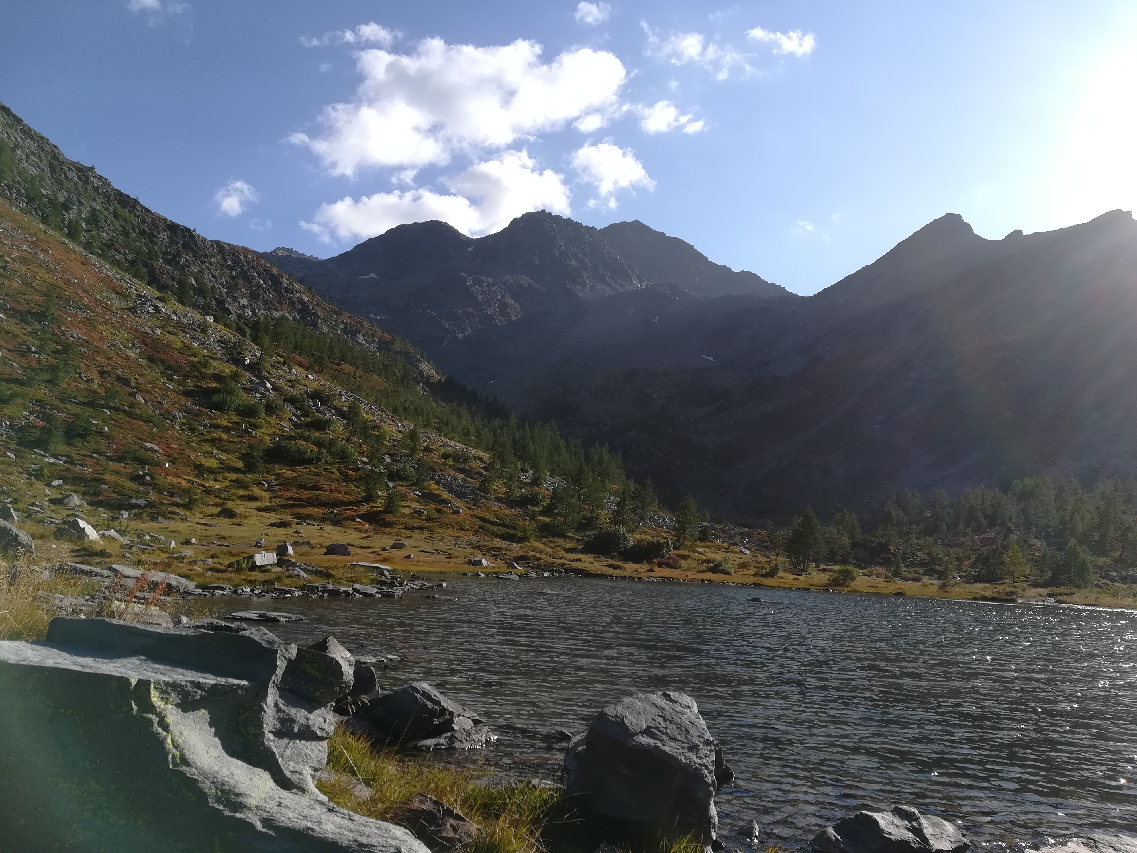 Il monte Colmet visto dal lago d'Arpy. La vetta nord è quella in secondo piano. La vetta principale (quella sud) è coperta dall'anticima.